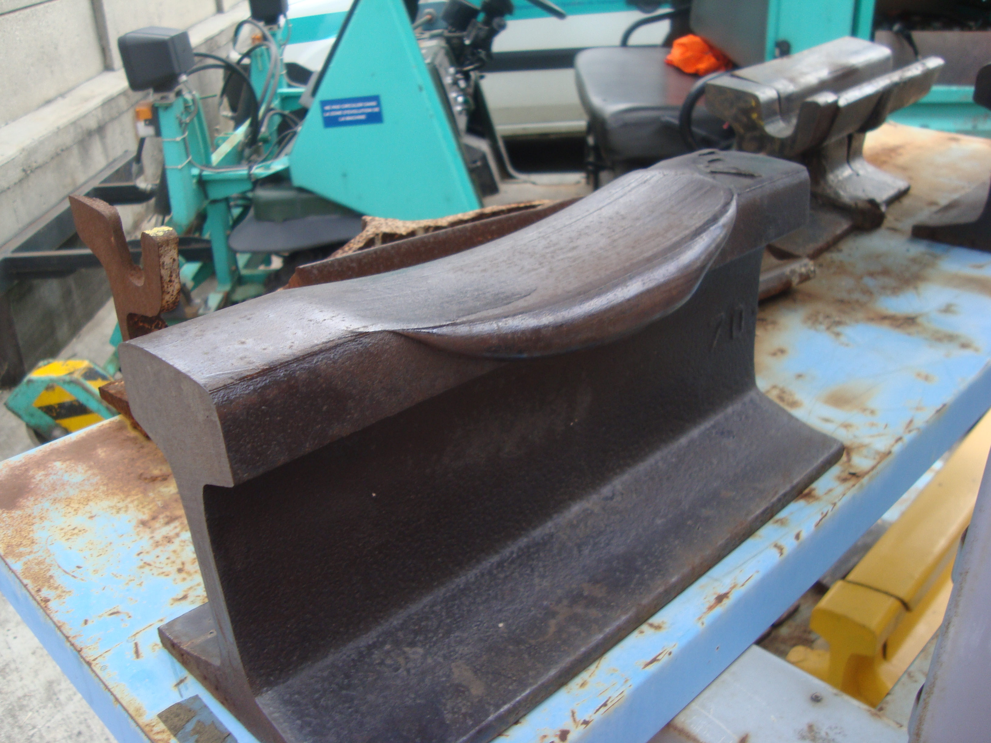 Rail détérioré suite au patinage d'une rame, aux ateliers du métro de Paris à La Villette.